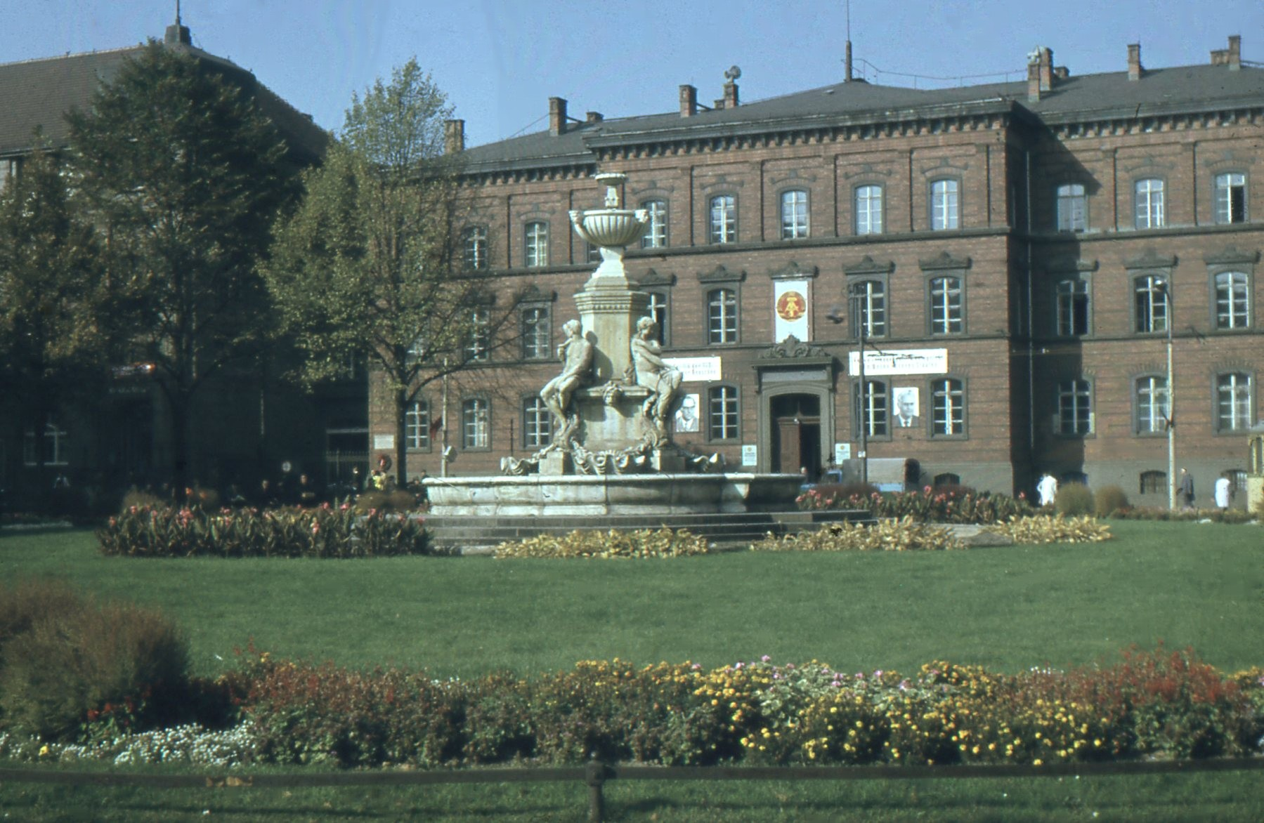 Der Görlitzer Postplatz mit dem Gerichtsgebäude und dem Brunnen (ohne heutige Muschelminna) in den 1970er Jahren.